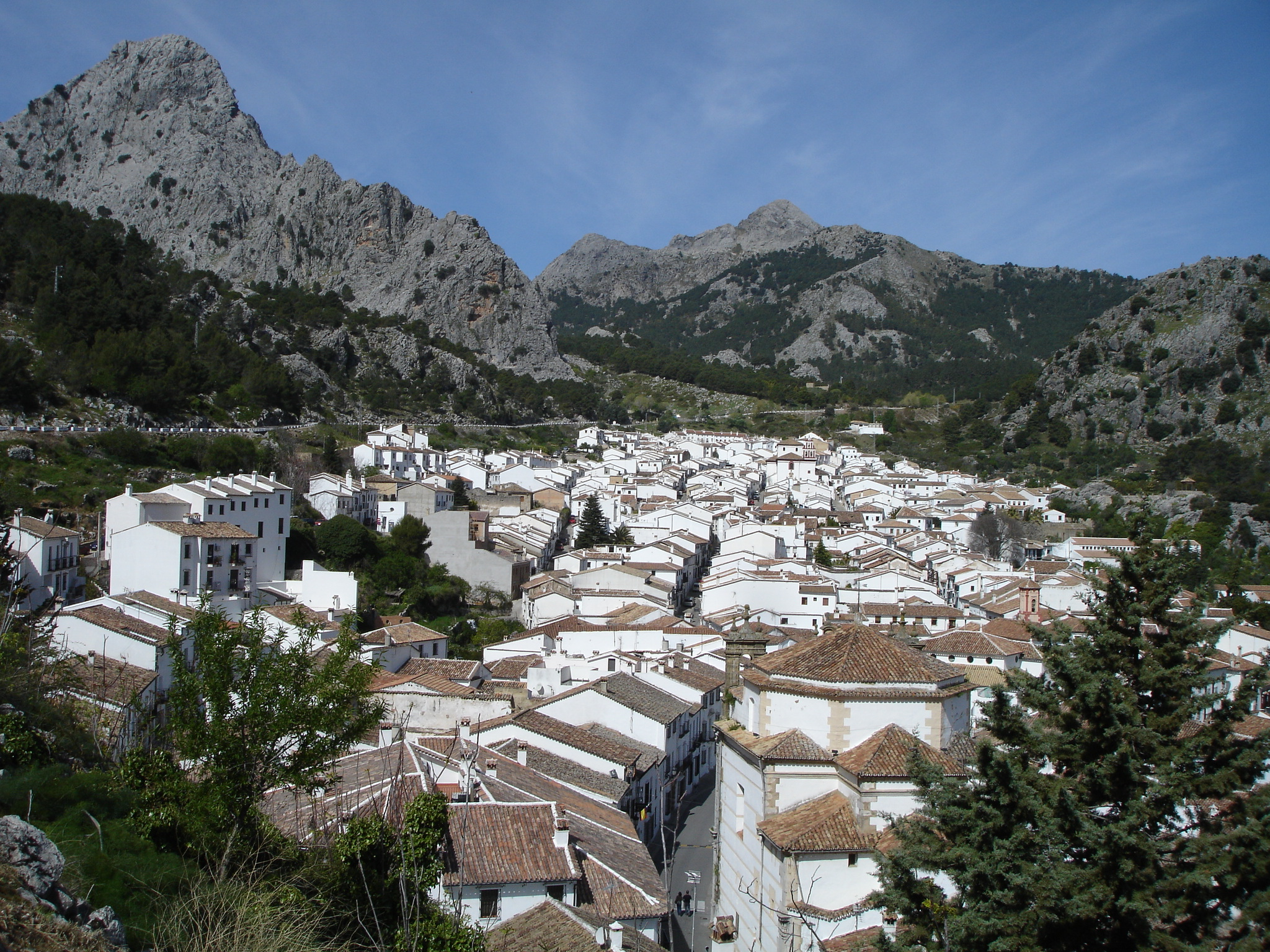 Grazalema desde la carretera A-372